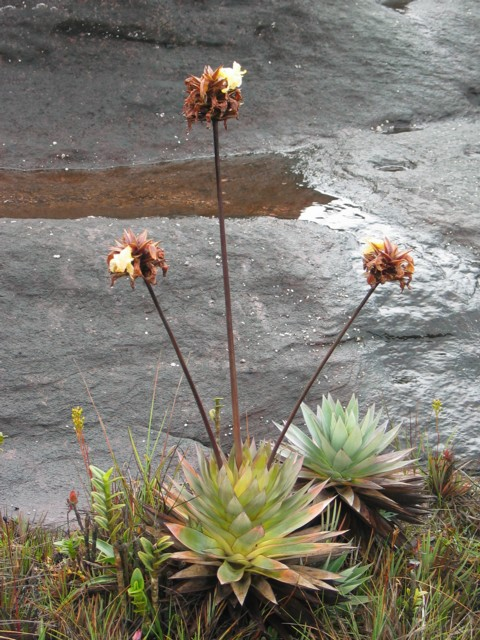 Orectanthe sceptrum @ Roraima-Tepui, Venezuela